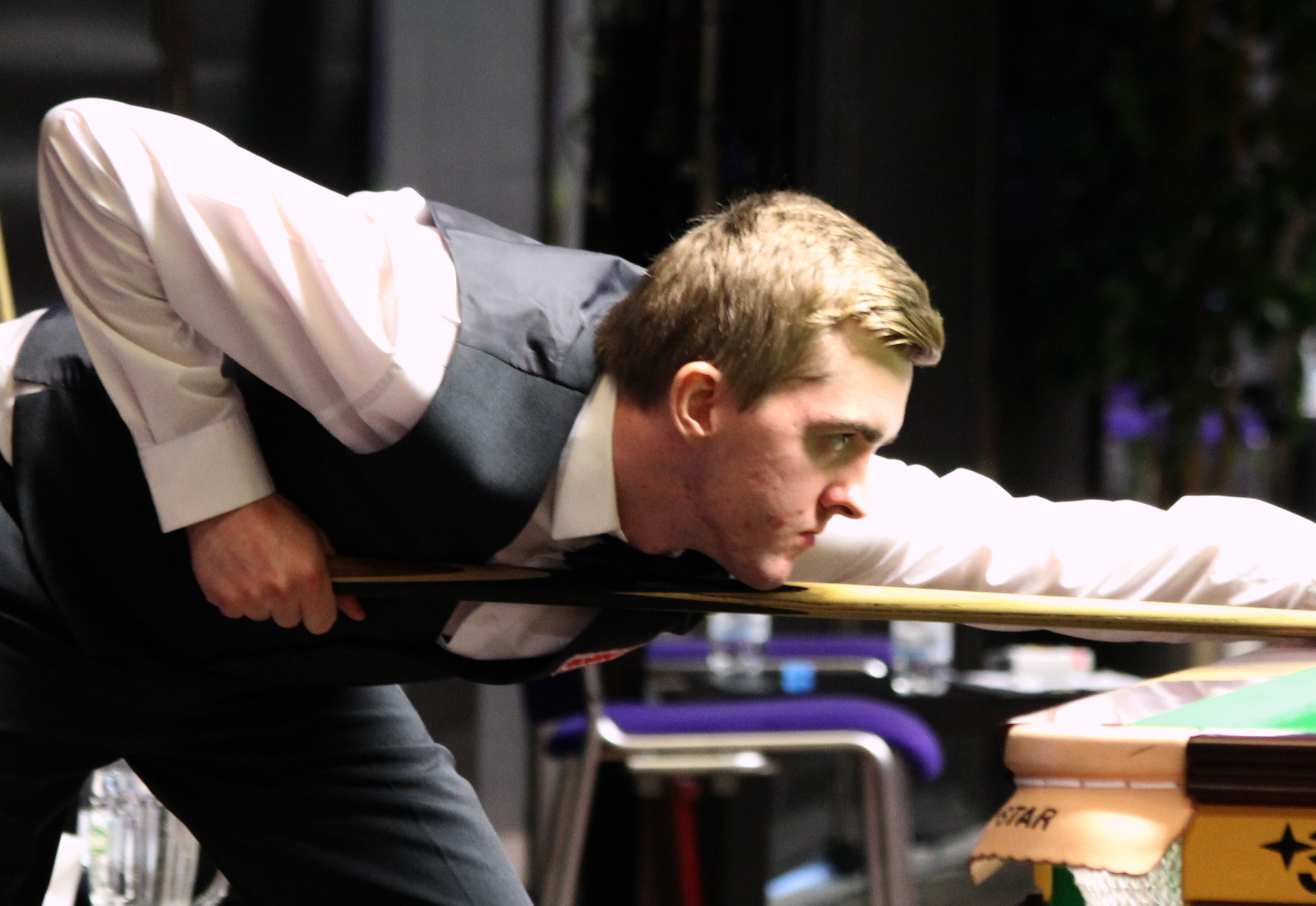 Ross Muir beim Paul Hunter Classic 2016